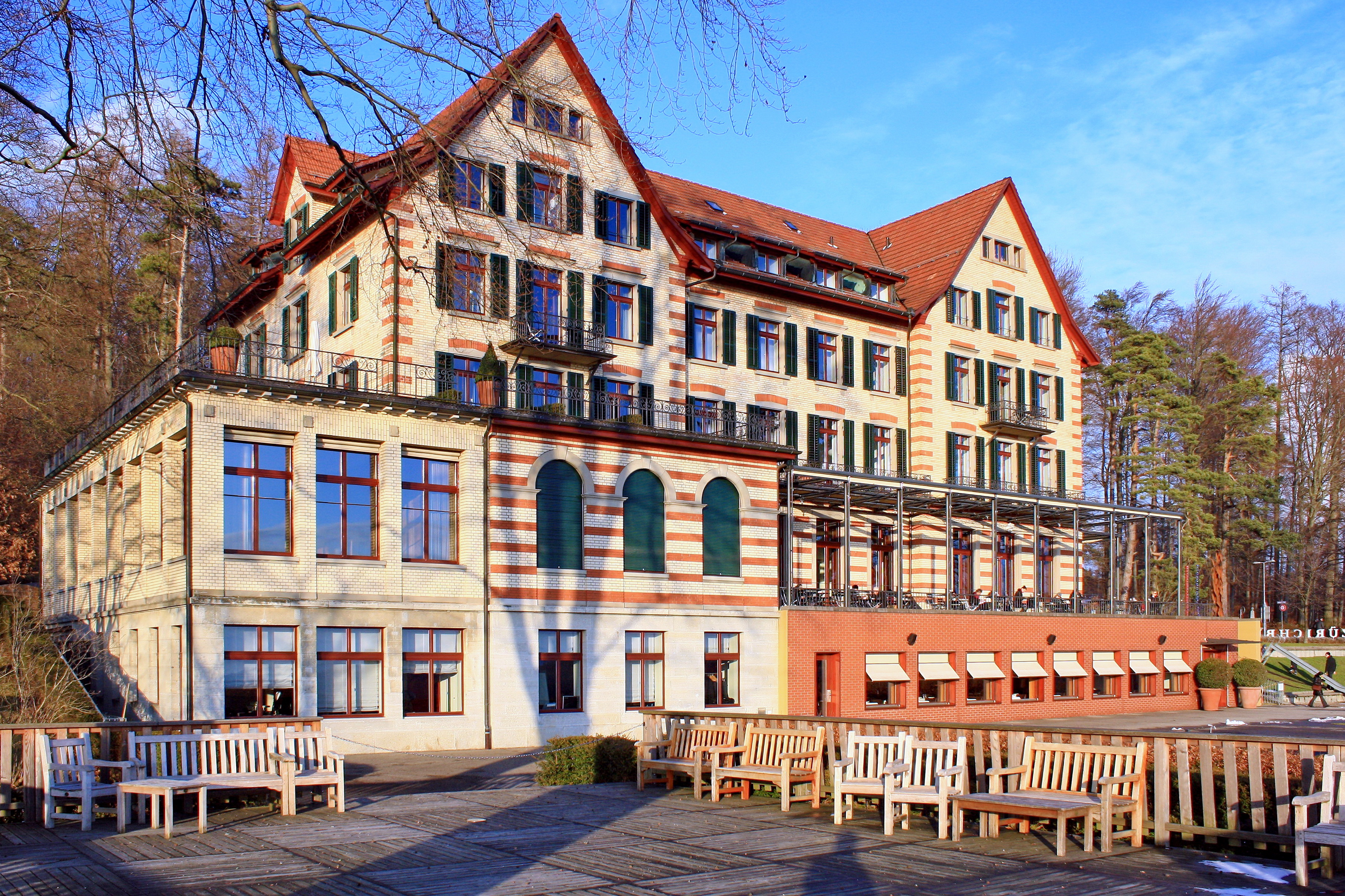 Hotel Zürichberg in Zürich (Switzerland)